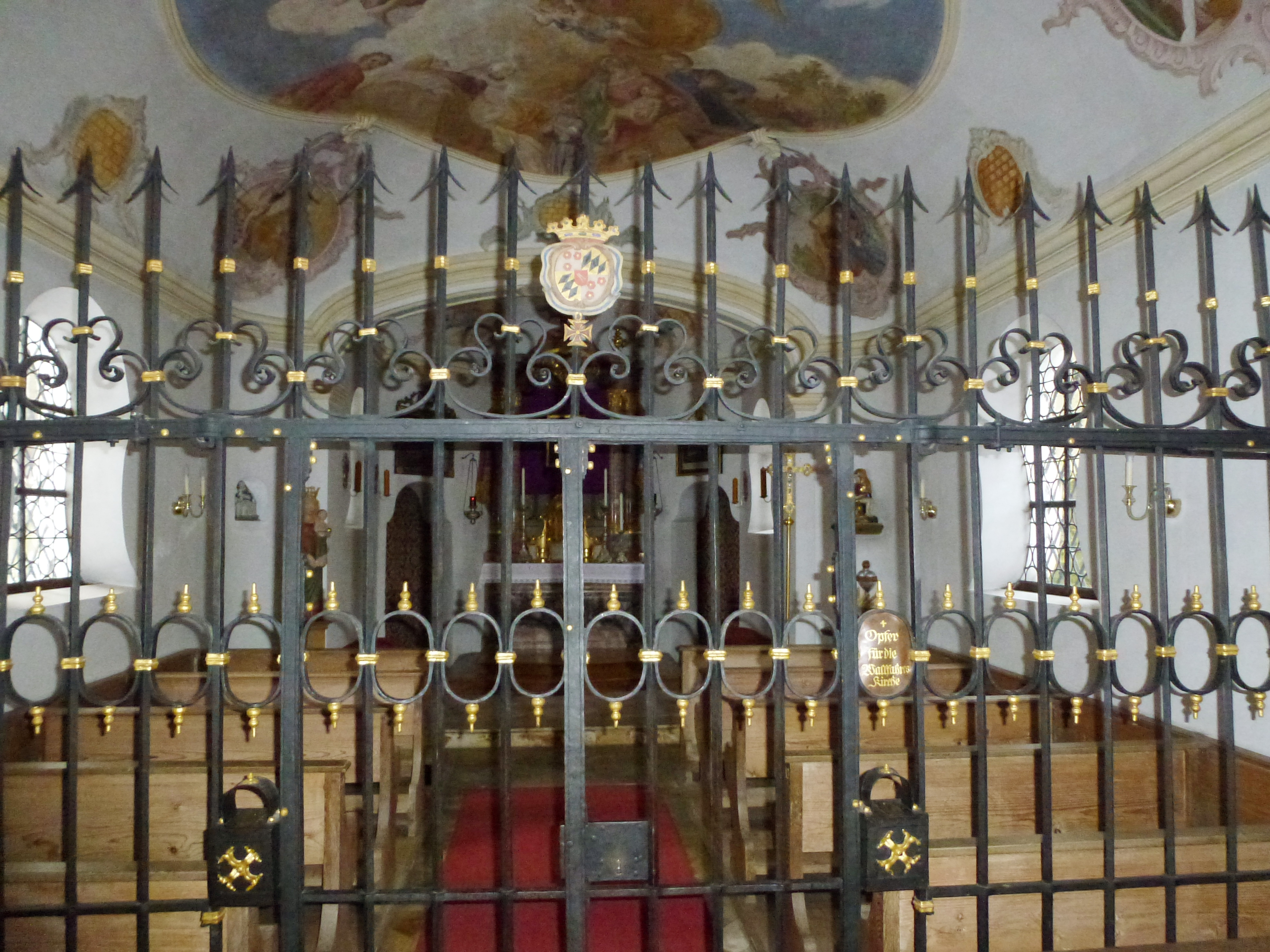 Weßling_Grünsink 2: Katholische Wallfahrtskapelle Maria Hilf, Blick zum Altar. Das schmiedeeiserne Gitter, das die Vorhalle vom Langhaus trennt, trägt an der horizontalen Strebe unterhalb des Wappens die Bezeichnung "M 1775 B"